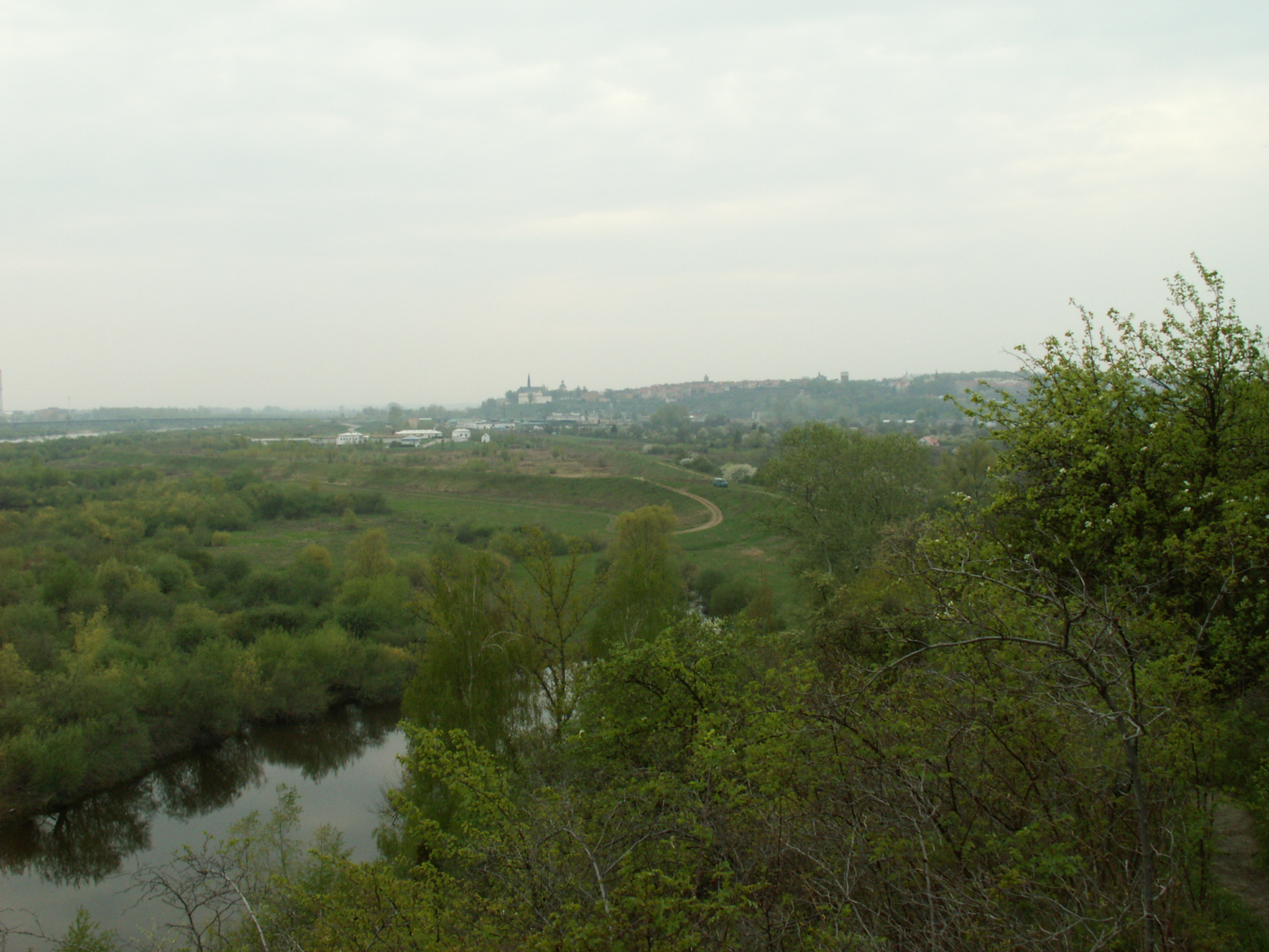 Góry Pieprzowe w Sandomierzu i panorama miasta